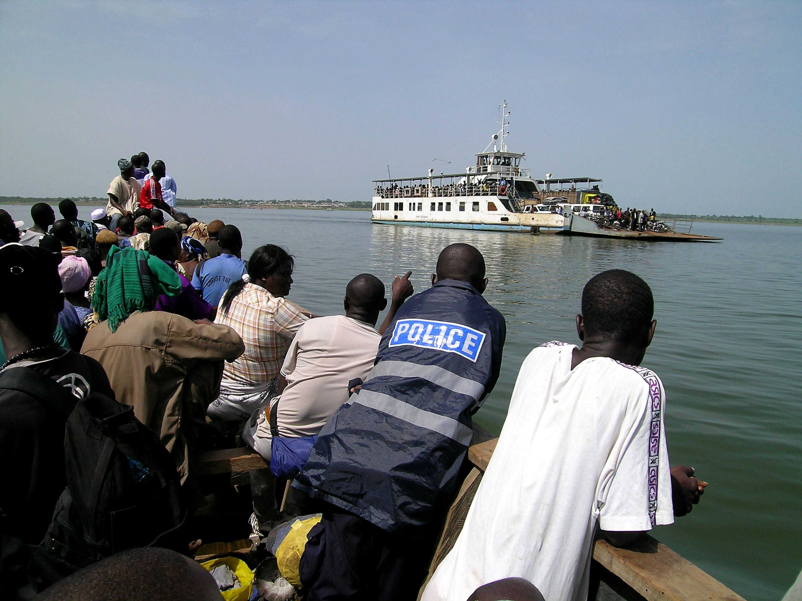 Ferry, Lake Volta, Ghana